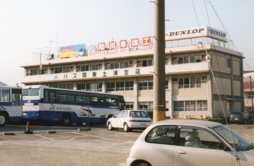 土浦支店 公道より撮影